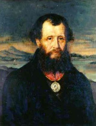 Ефим Алексеевич Черепанов